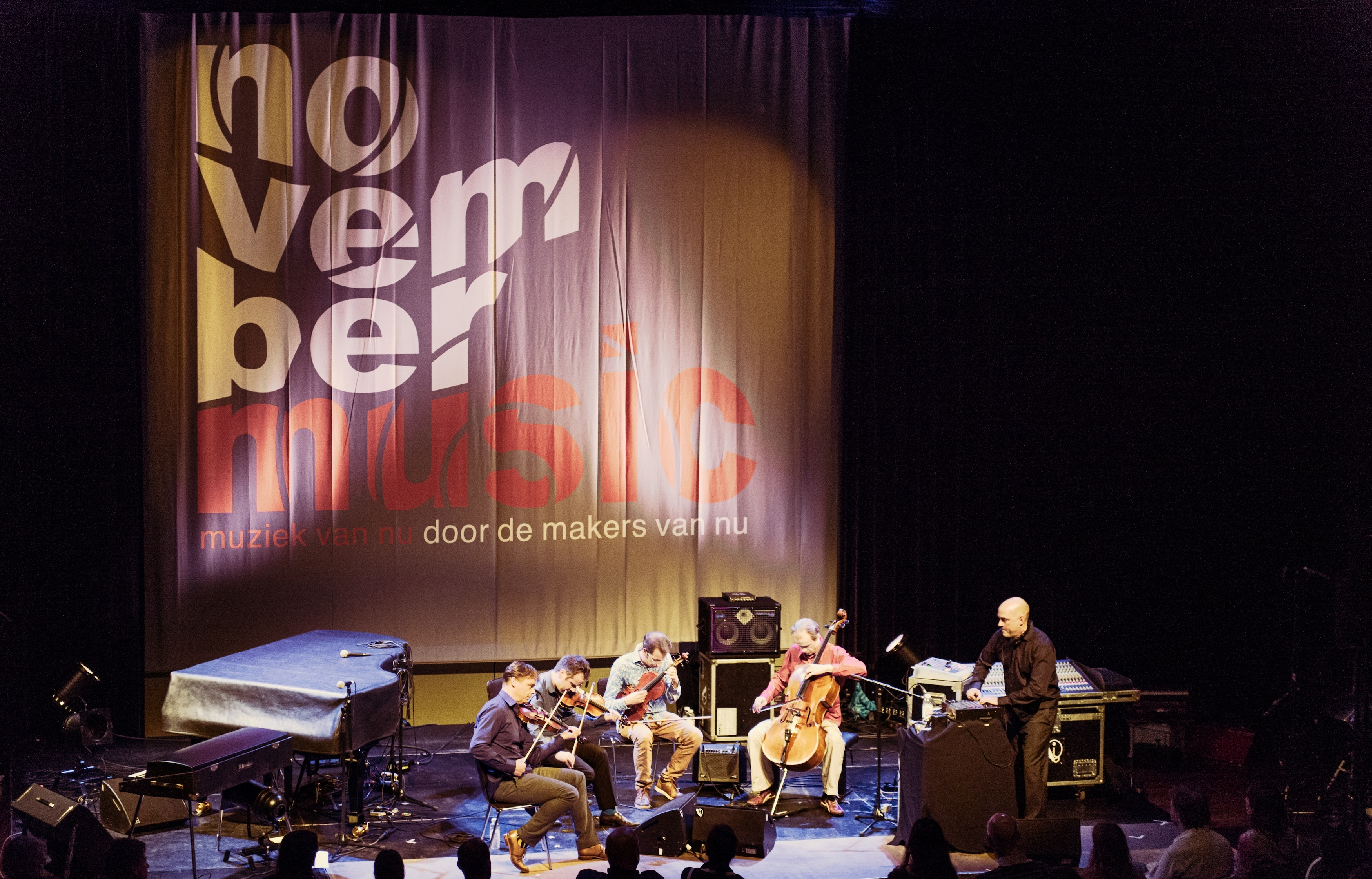 November Music